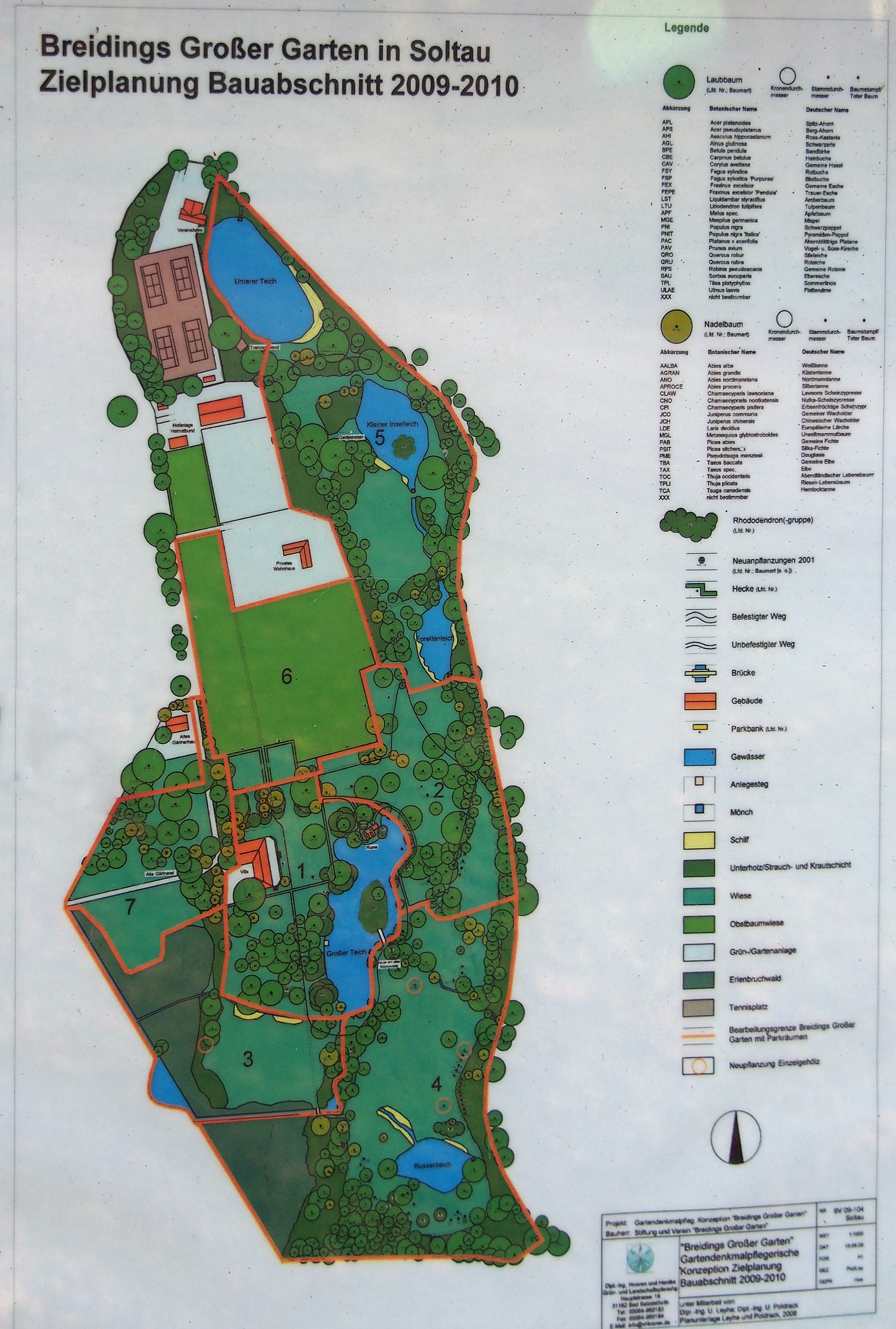 Übersichtsplan Breidings Garten in Soltau (öffentlich ausgestellte Infotafel im Garten)